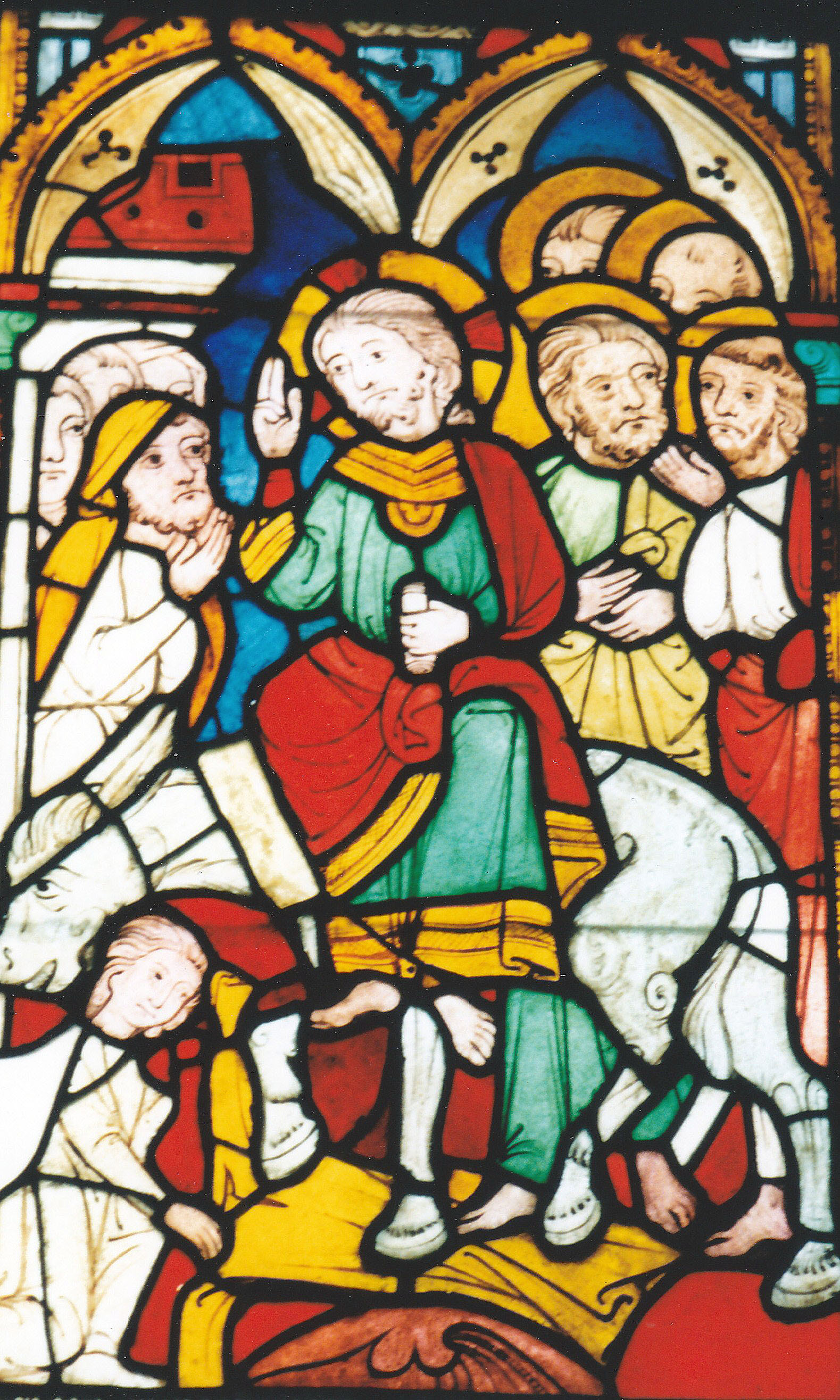 Alskog.Medeltida glasmålning.